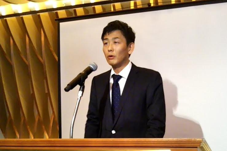 京都党の政策研究会にて開会挨拶をする村山祥栄議員（2017年4月15日撮影）